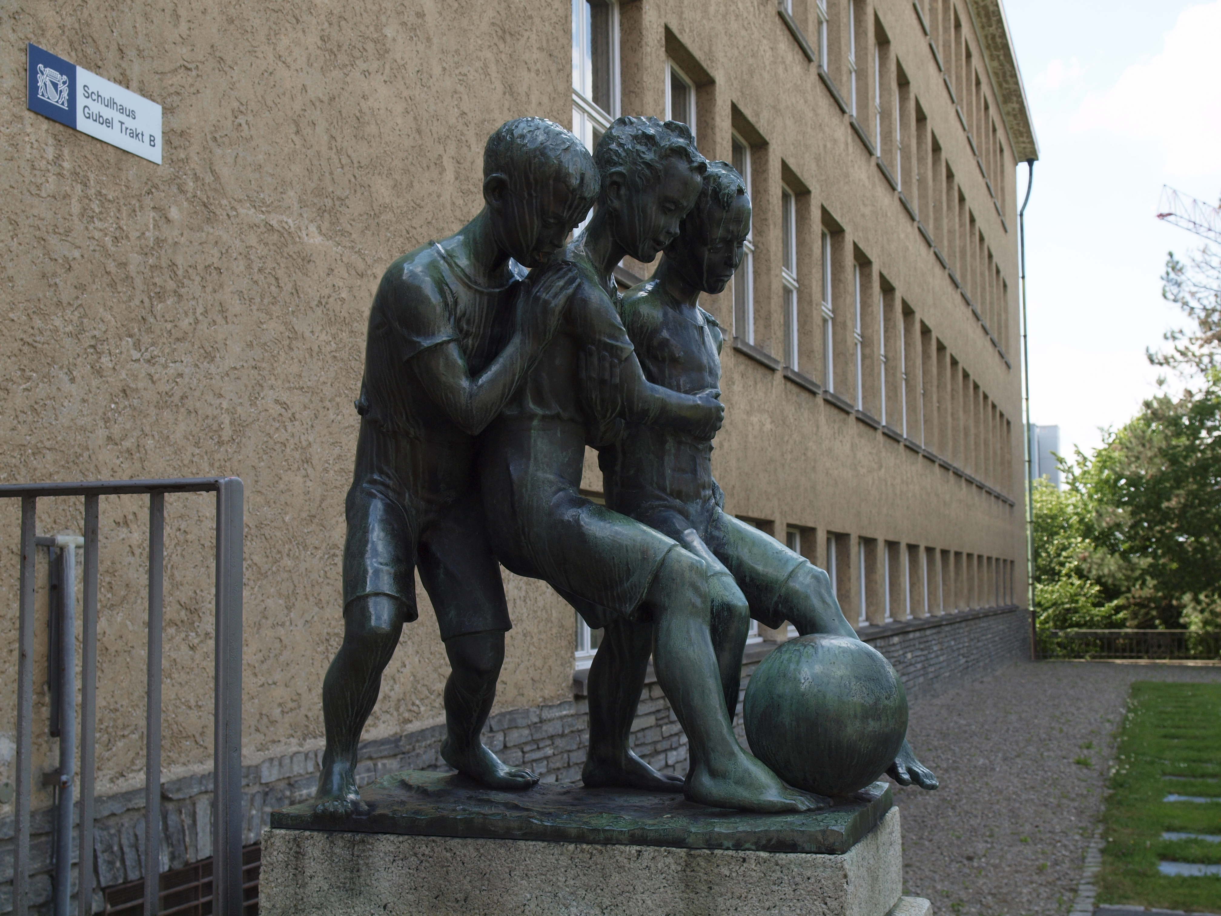 Auf dem Areal des Schulhaus Gubel in Zürich Oerlikon, steht eine Skulptur von Hans Markwalder. Die Knabengruppe wird mit 1936 datiert, dabie ist unkalr ob Herstellungs- oder Aufstelljahr